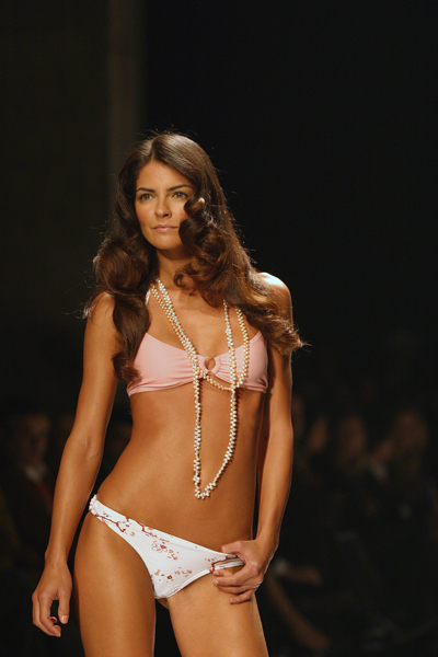 Luísa Beirão in Porto, Portugal